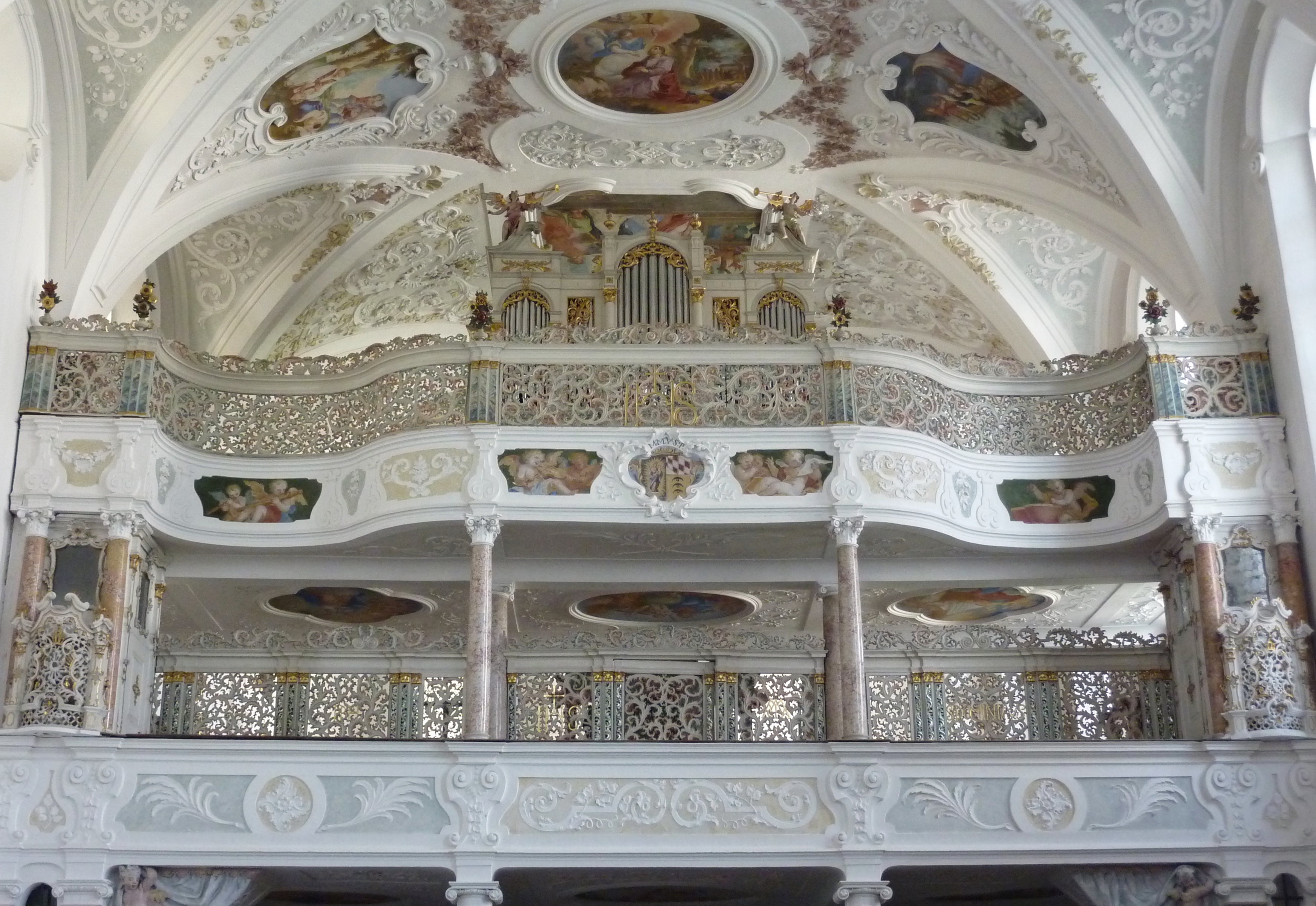 Klosterkirche Maria Medingen (Mariä Himmelfahrt) in Mödingen (Landkreis Dillingen an der Donau) des ehemaligen Dominikanerinnenklosters (heute Provinz Maria Medingen der Dillinger Franziskanerinnen), Doppelempore im Westen